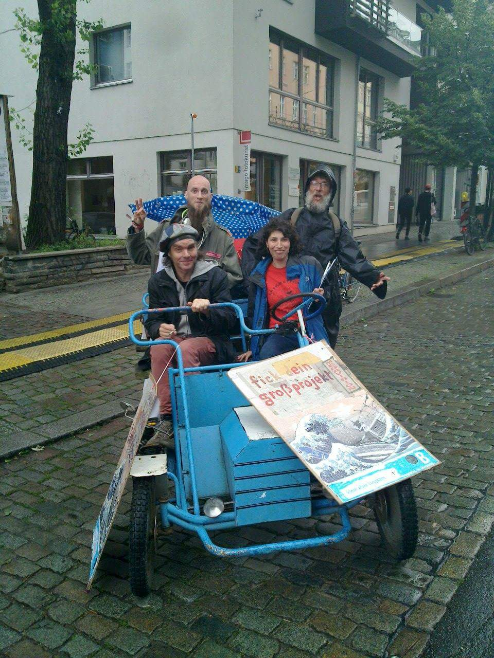 Wahlkampffahrzeug der "Bergpartei" zum Bundestagswahlkampf 2017